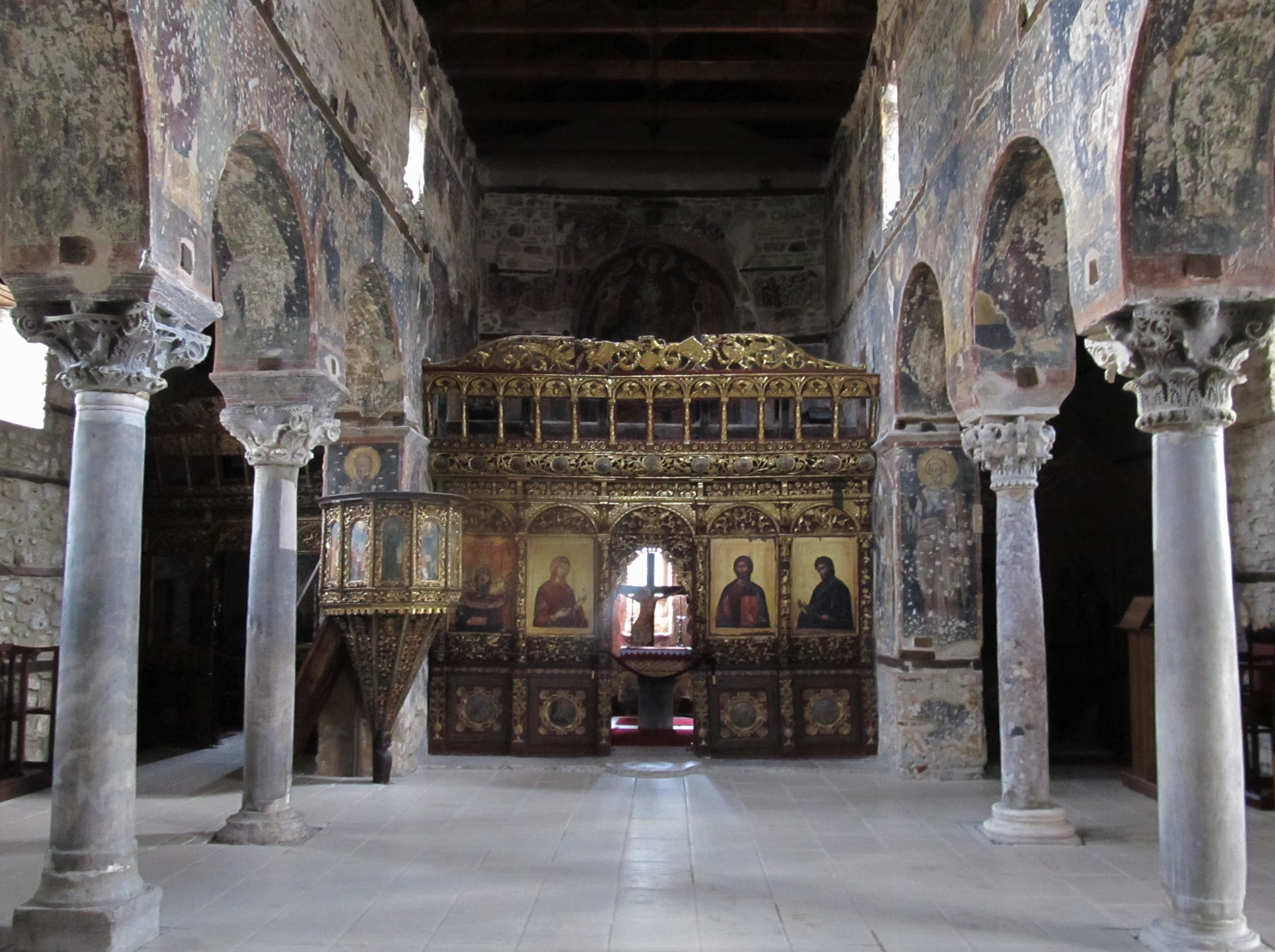 Вътрешен облик на старата митрополитска църква във Воден, Северна Гърция